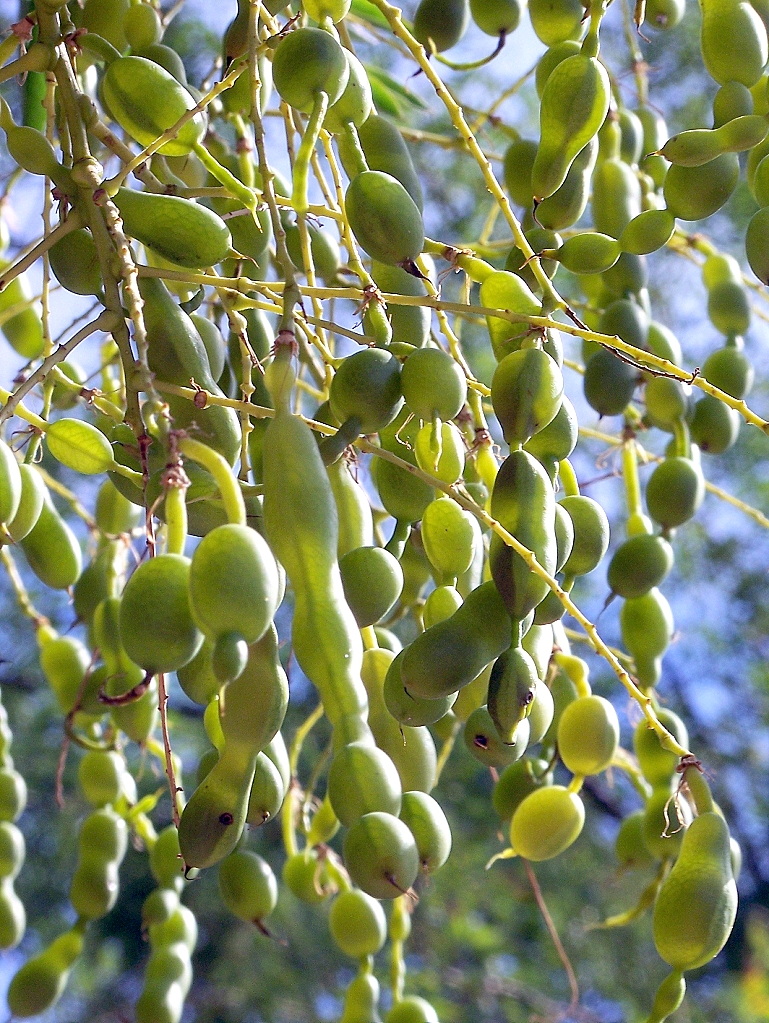 Sophora japonica (Acacia del Japón) : Frutos (legumbres) monoliformes inmaduros - Calle de Aniceto Marinas, Ribera Oueste del Río Manzanares, Madrid (España).